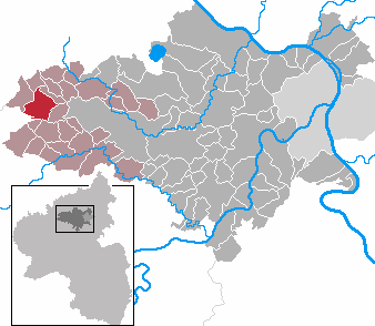 Gemeinde Baar im Landkreis Mayen-Koblenz